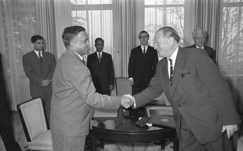 Unterzeichnung eines Deutsch-indischen Abkommens im Auswärtigen Amt.